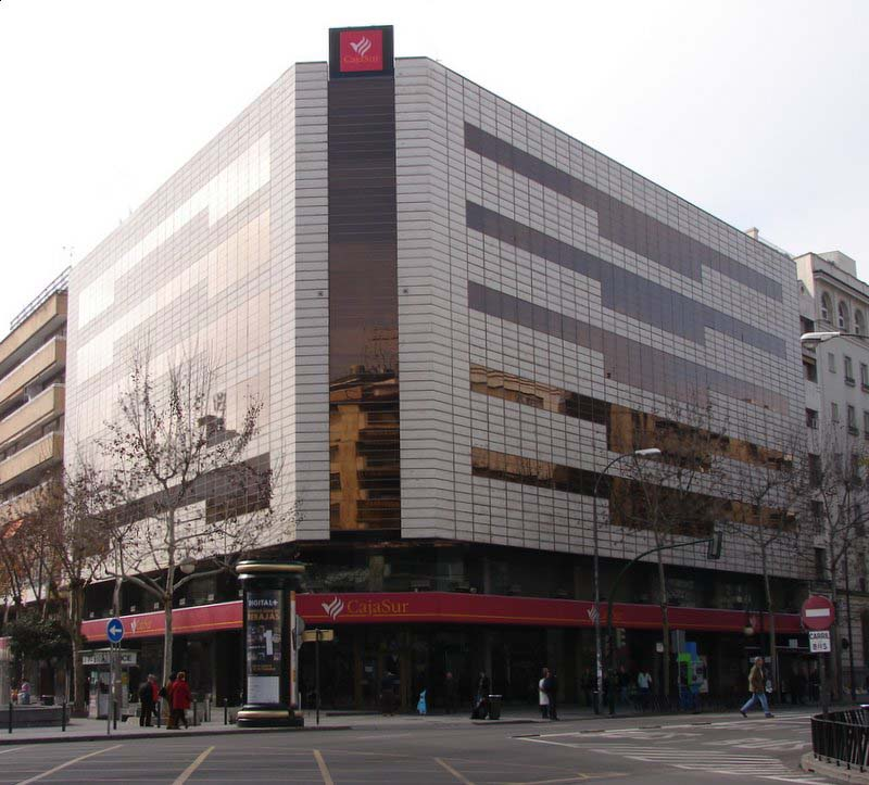 Edificio de la antigua Caja Provincial de Ahorros de Córdoba (hoy sede de CajaSur), en Córdoba (España).